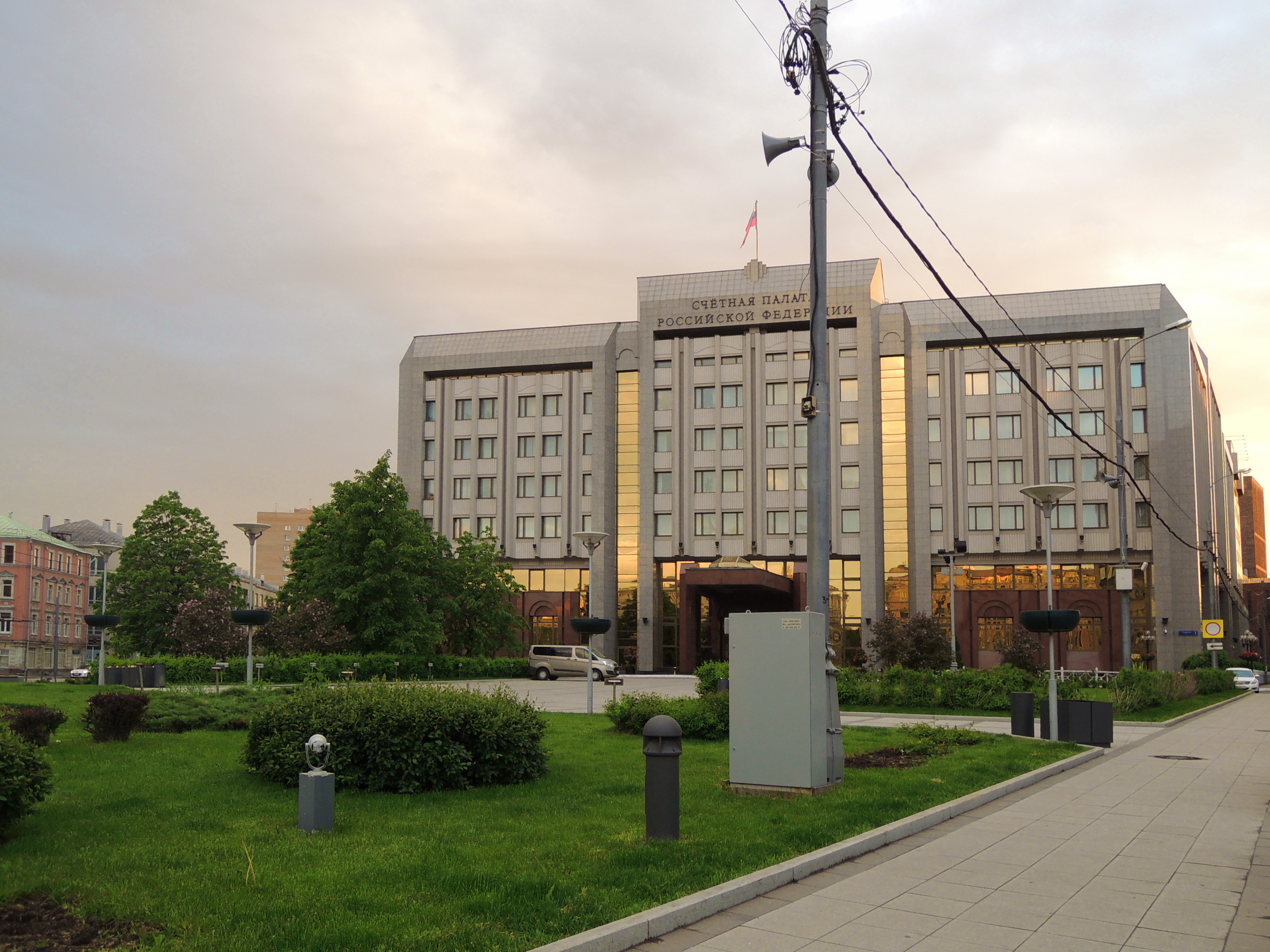 Zubovskaya Square